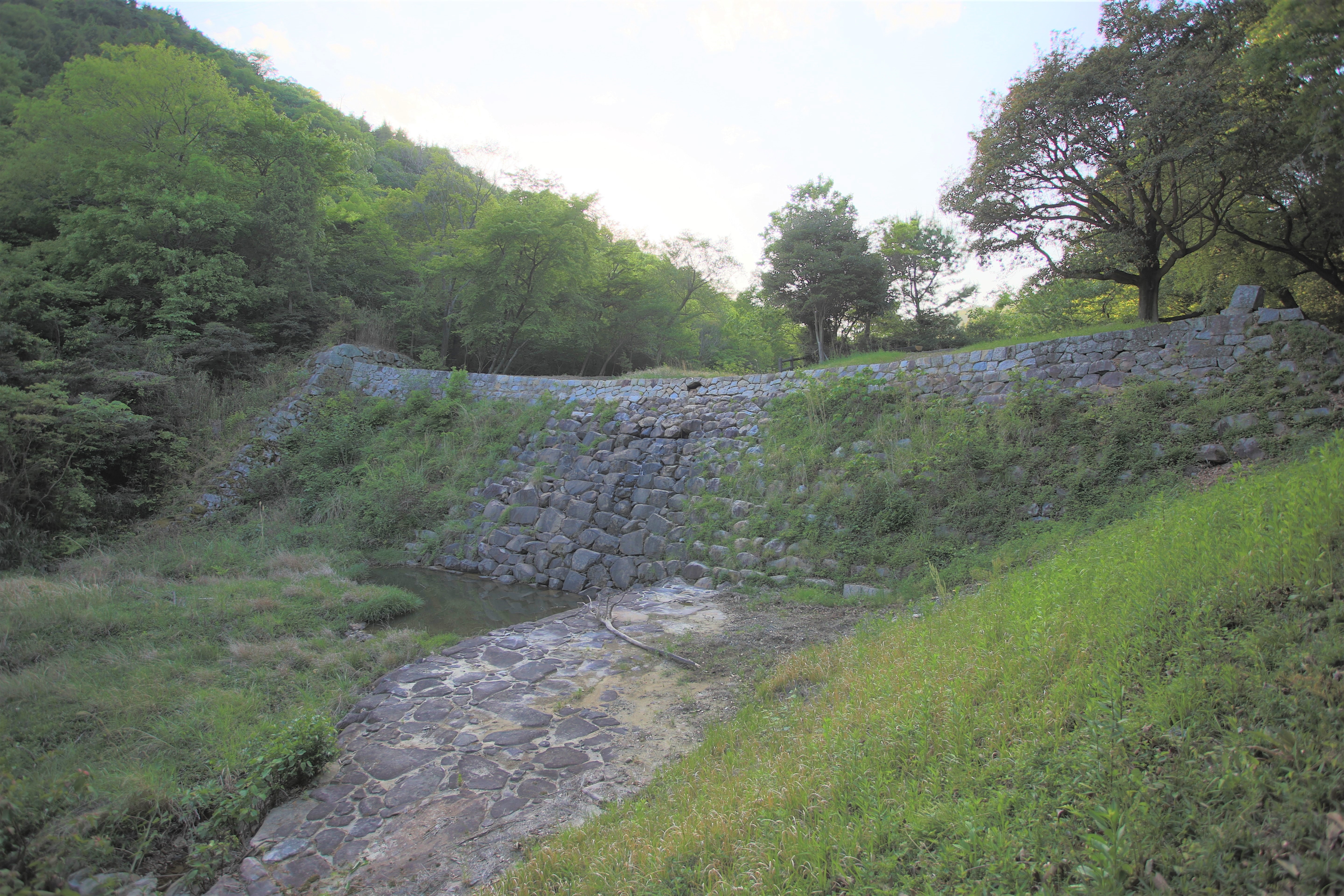 広島県福山市津之郷町の本谷川砂留。江戸時代中期の石積砂防ダム。